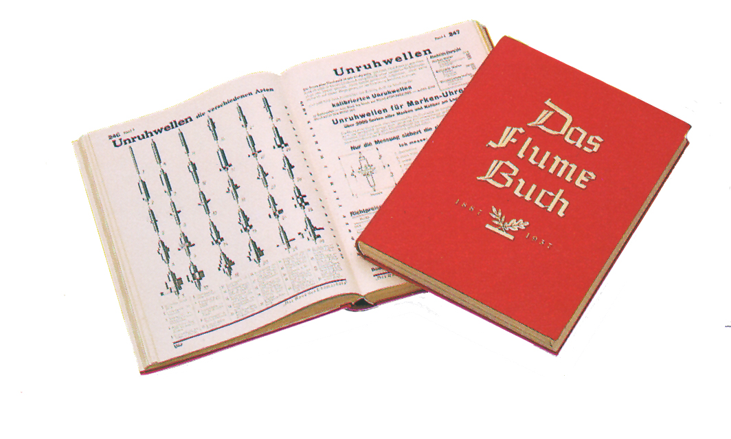 Das Flume-Buch zum 50-jährigen Jubiläum 1937